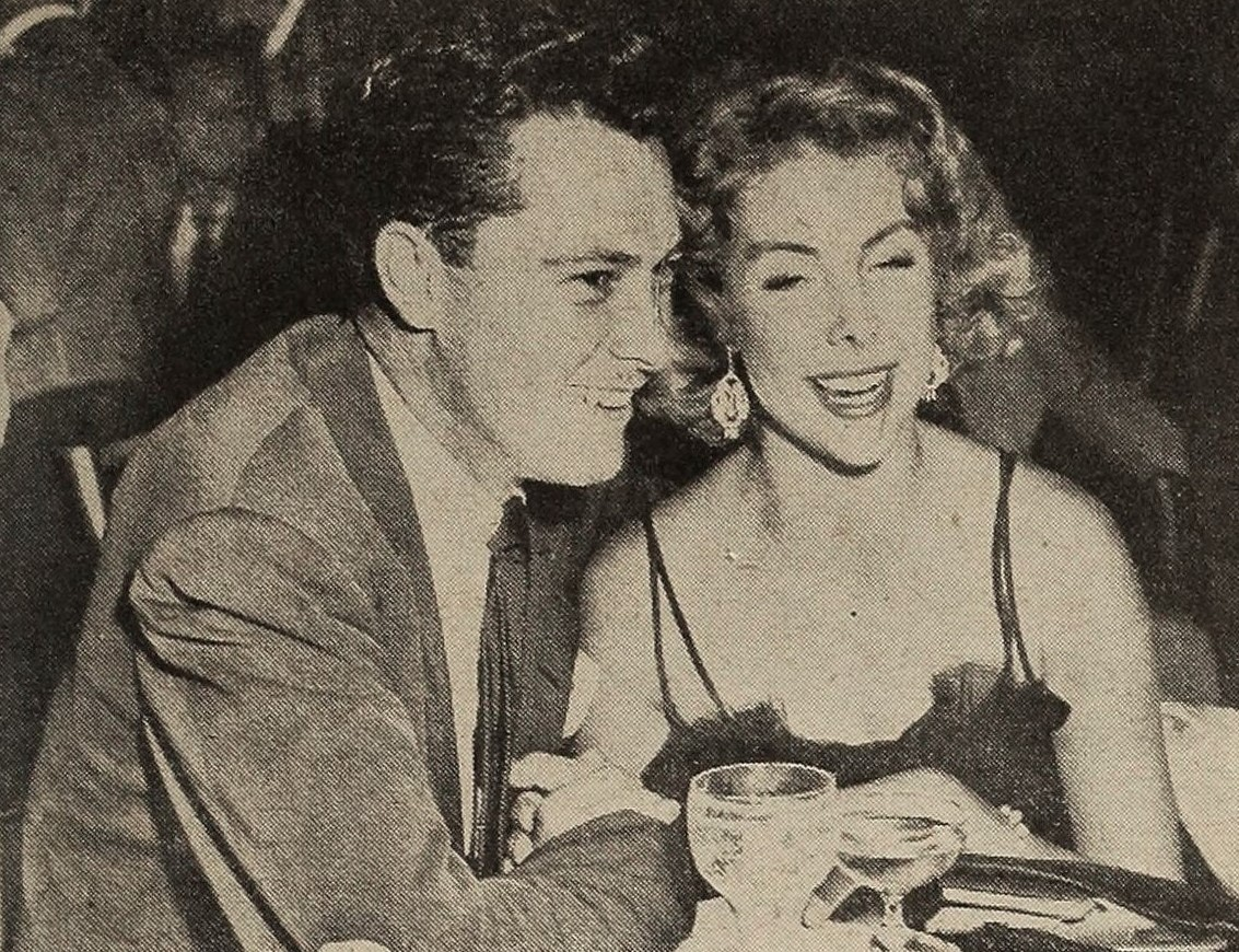 Nicky Hilton and Betsy von Furstenberg, 1952